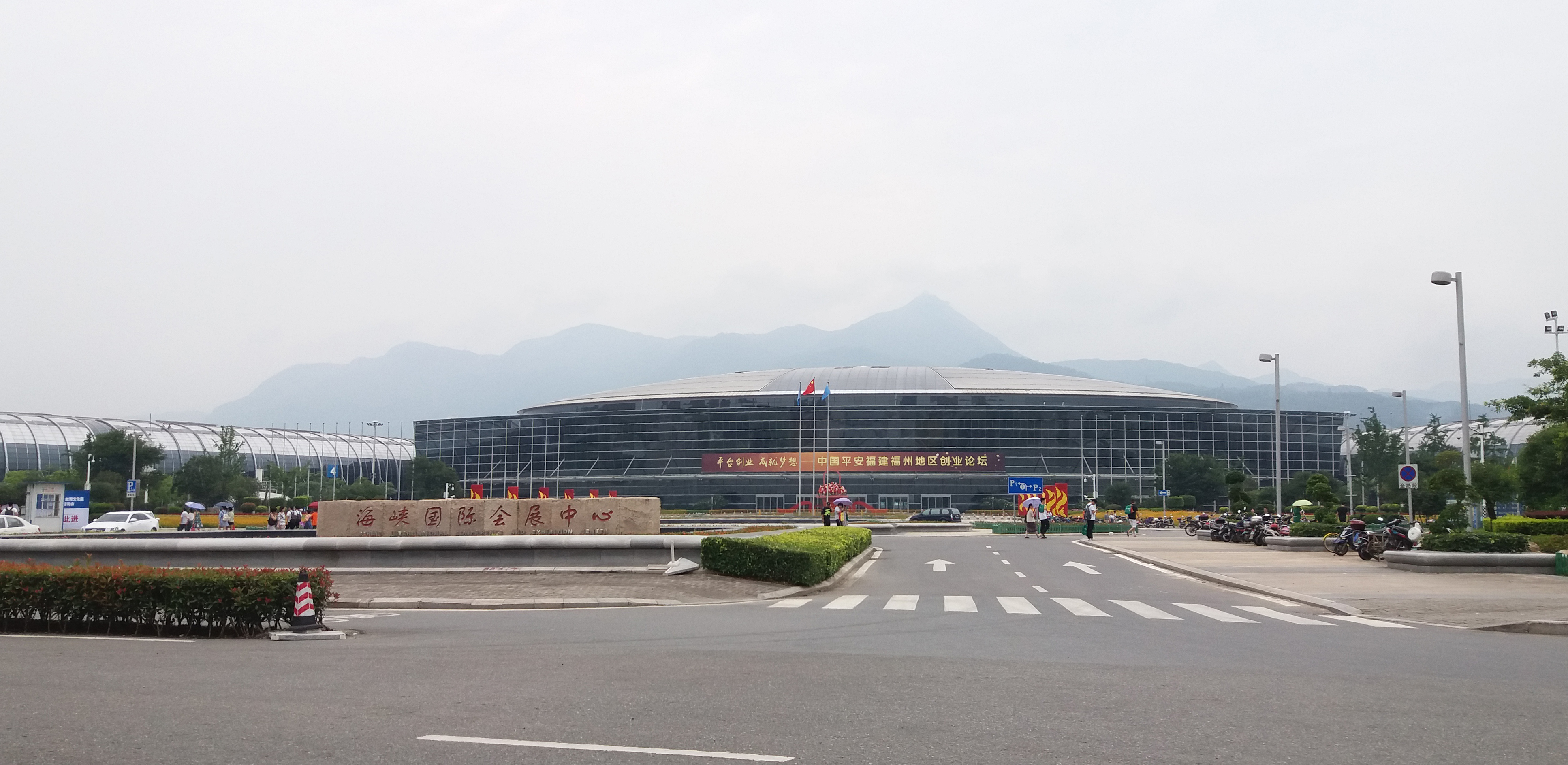 福州海峡国际会展中心